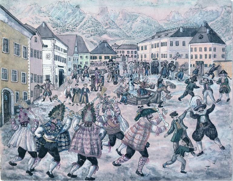 Imster Schemenlaufen, Am Stadtplatz; Aquarell; die älteste Darstellung der Imster Fasnacht, ca. 1830